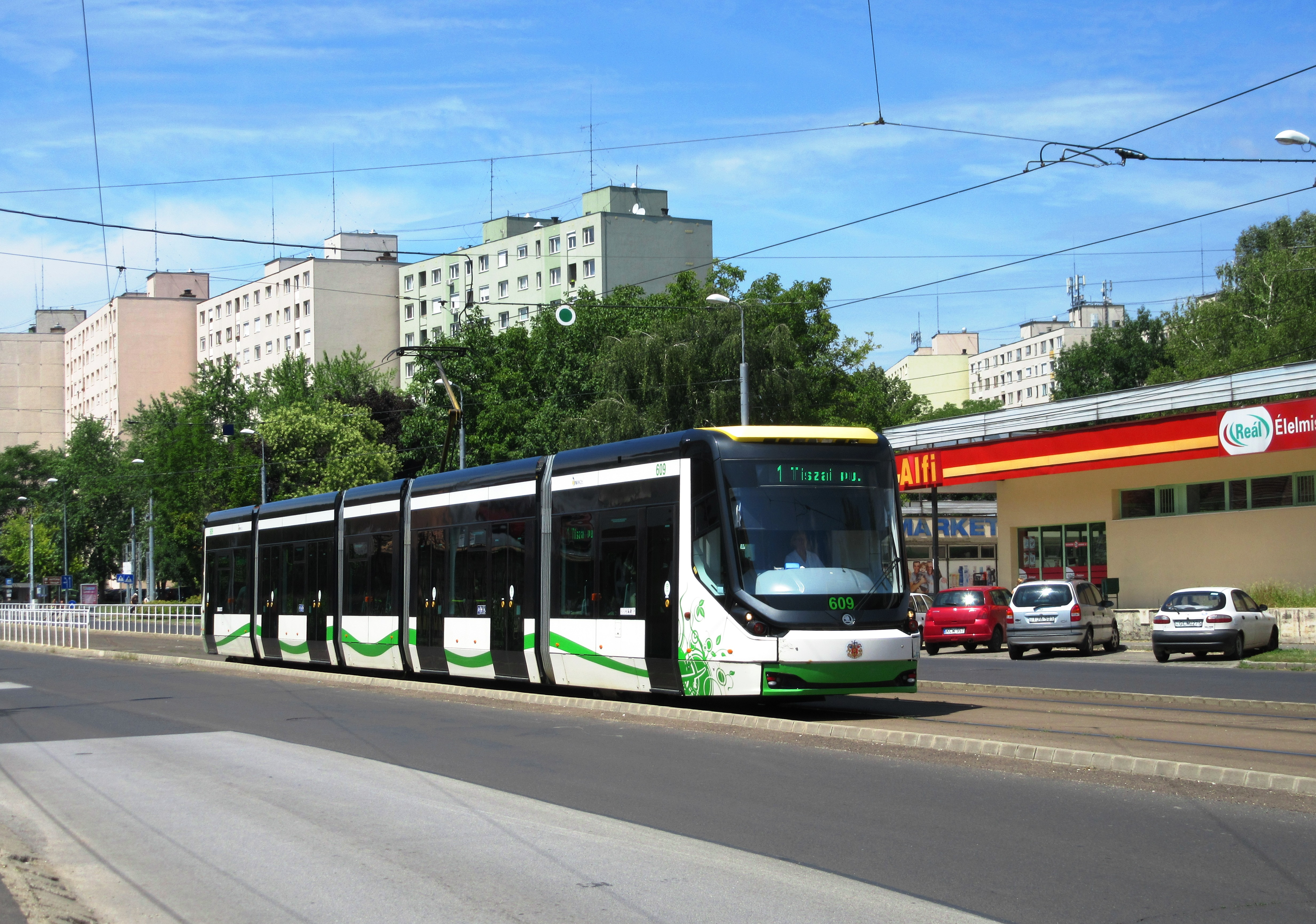 Skoda vili Miskolc